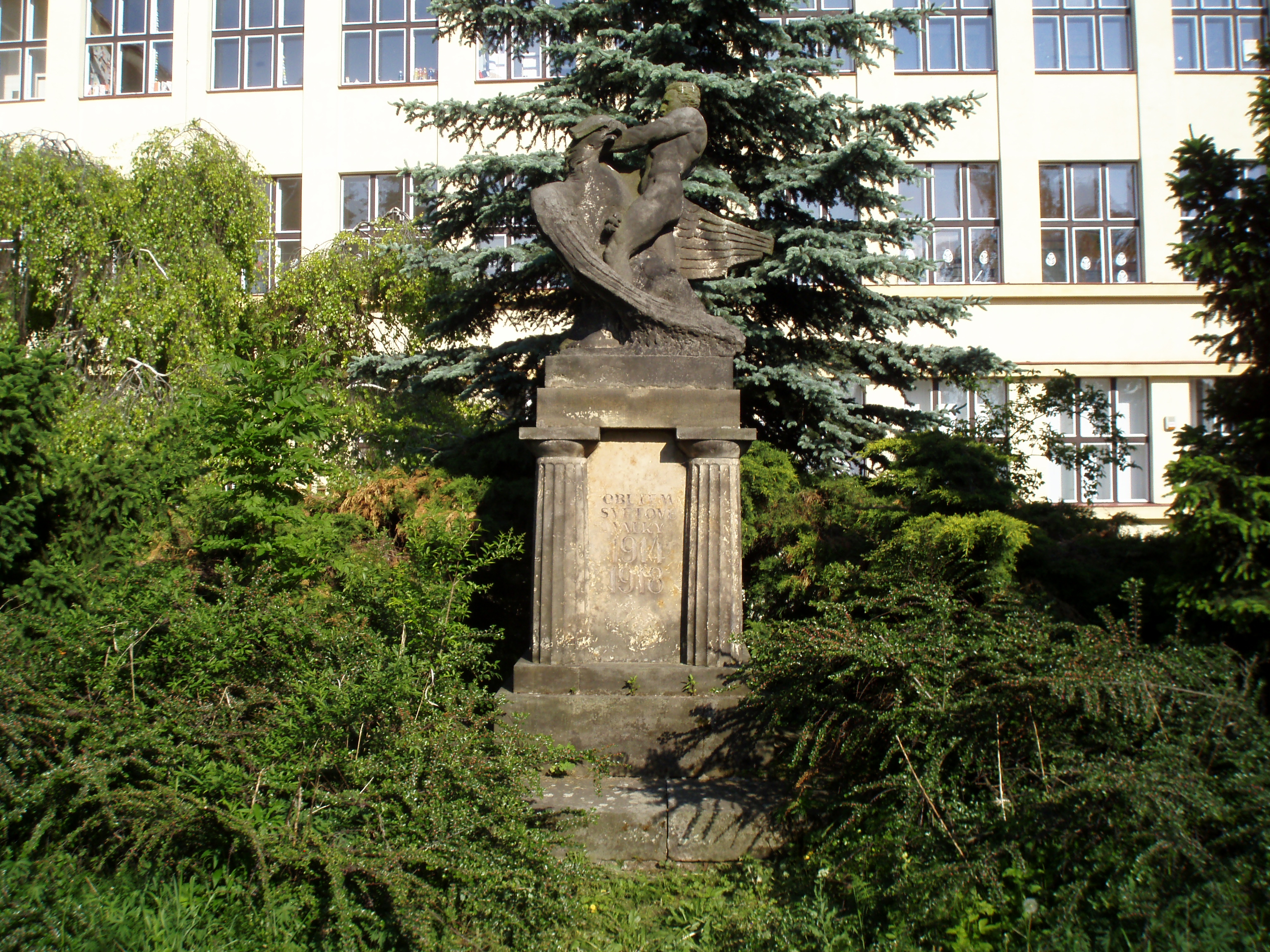 Pomník padlým v 1. světové válce v Plotištích nad Labem